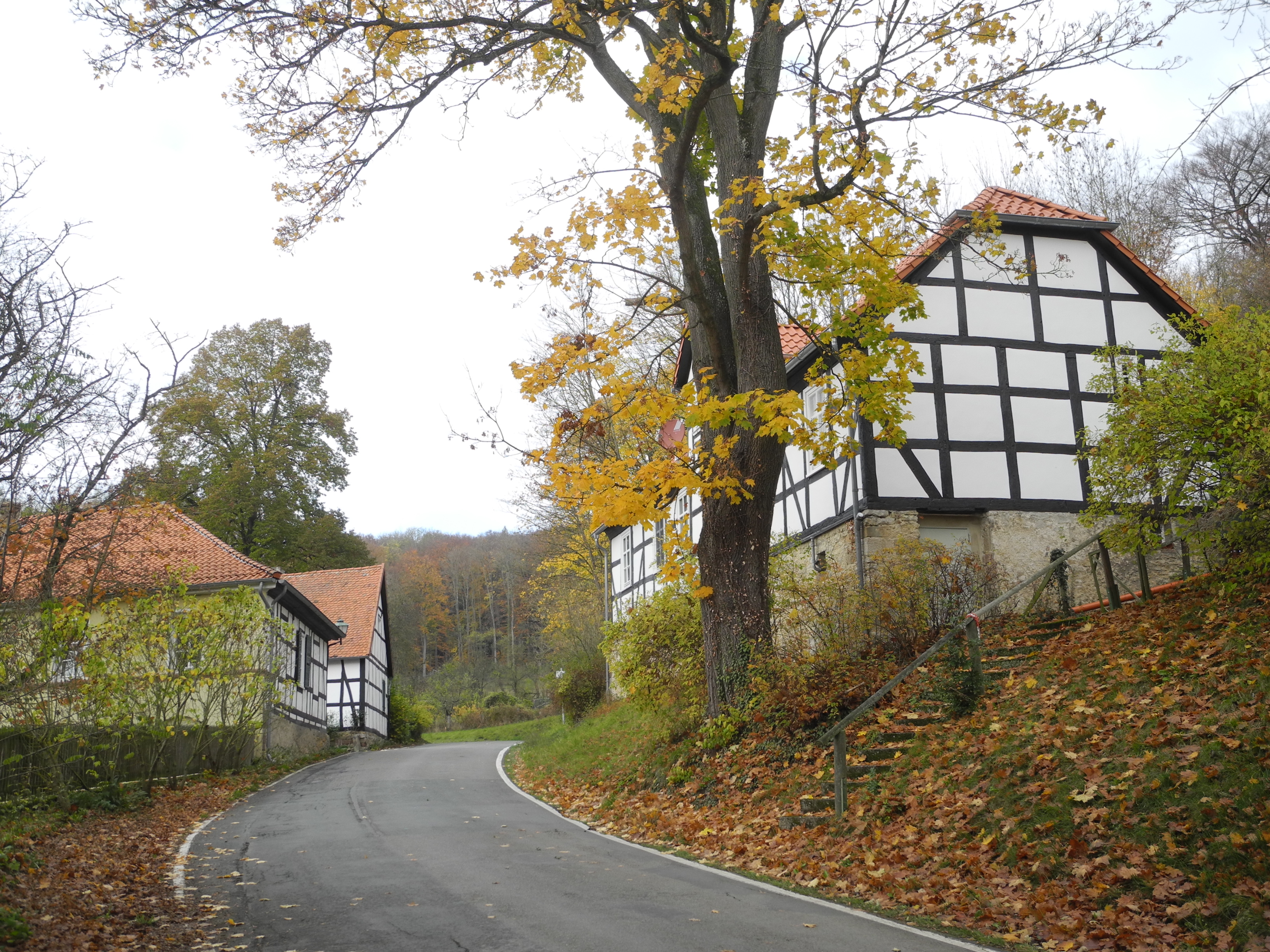 Escheberg, heute ein Stadtteil von Zierenberg, Hessen, Deutschland.